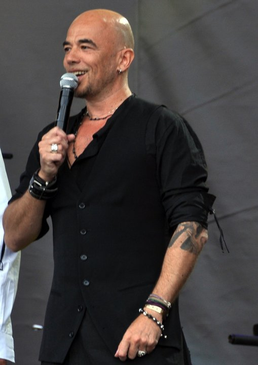 Pascal Obispo au concert pour l'égalité de SOS-Racisme